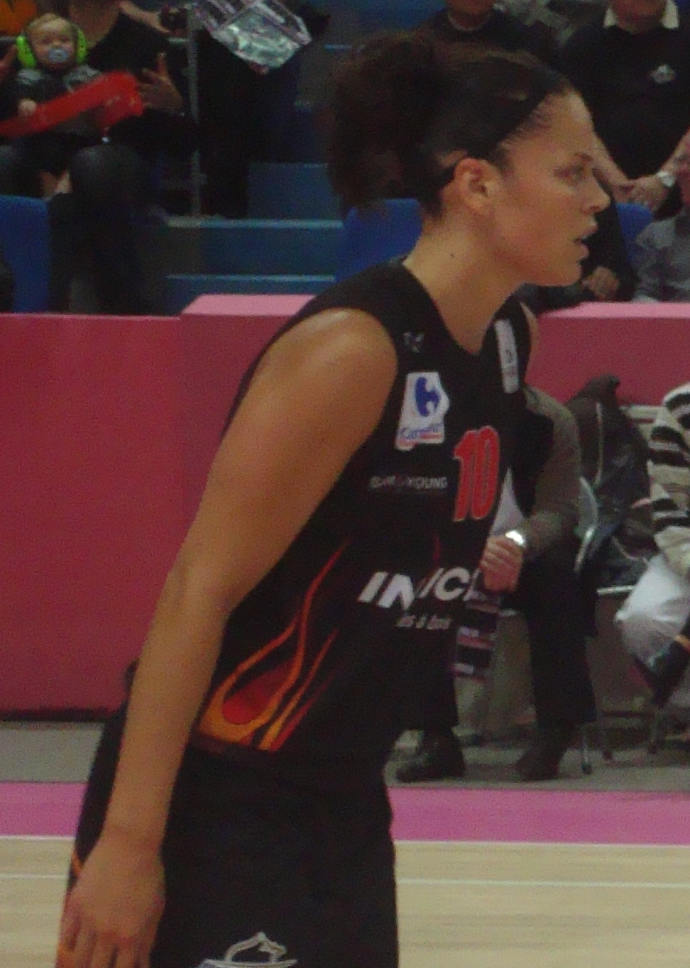 La basketteuse américaine Kristen Mann sous le maillot de Charleville.